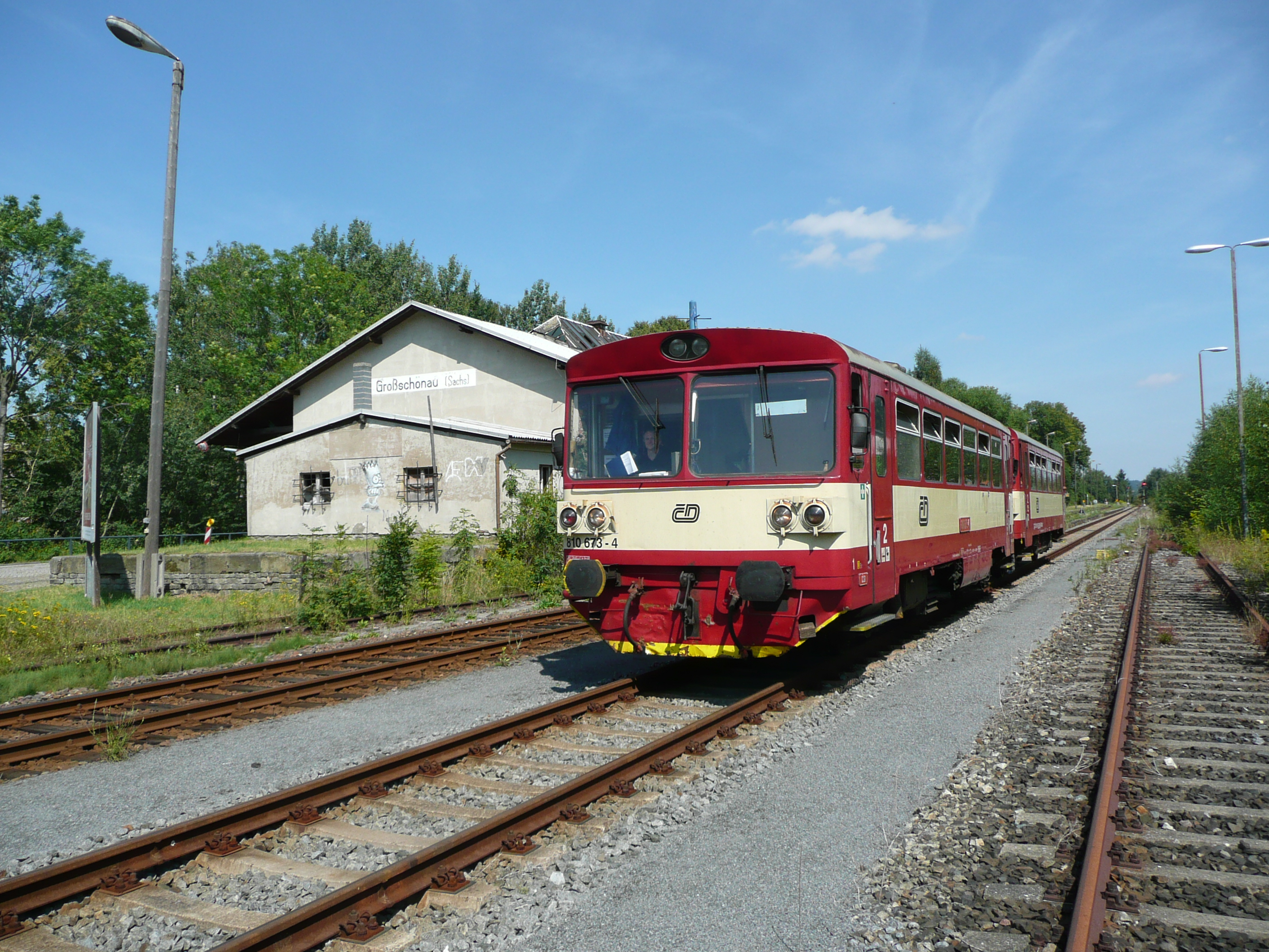 810 673 in Großschönau